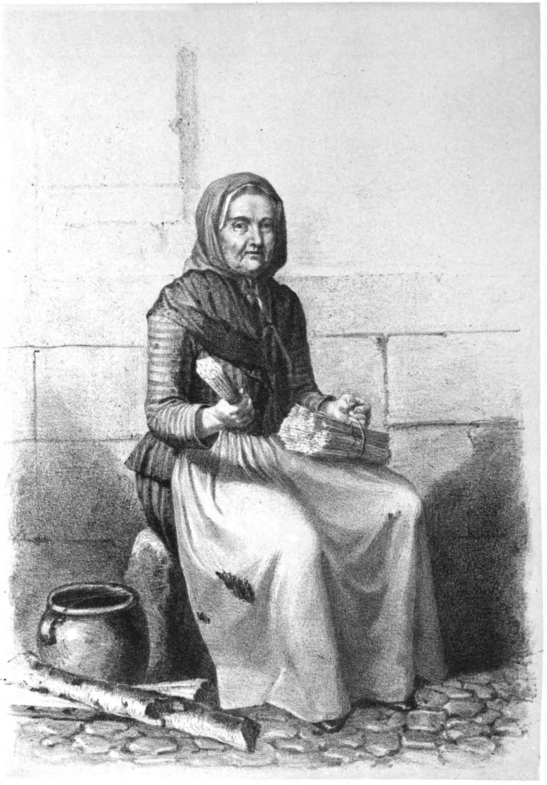 Litografi efter En svafvelsticksförsäljerska av Pehr Hilleström.